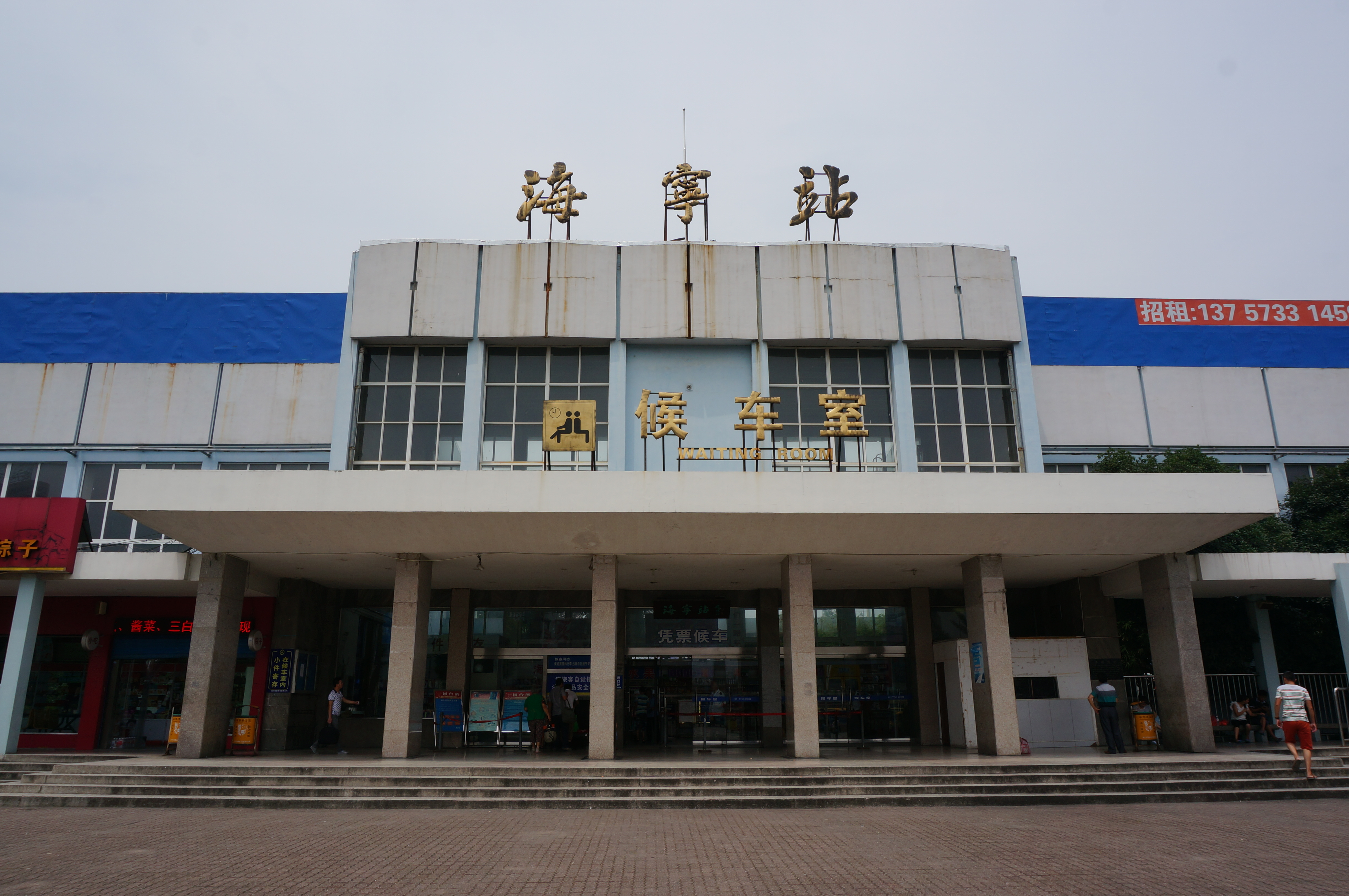 海宁火车站，站房近景。